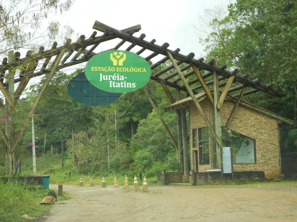 Entrada da Estação Ecológica da Juréia - Itatins , Peruíbe